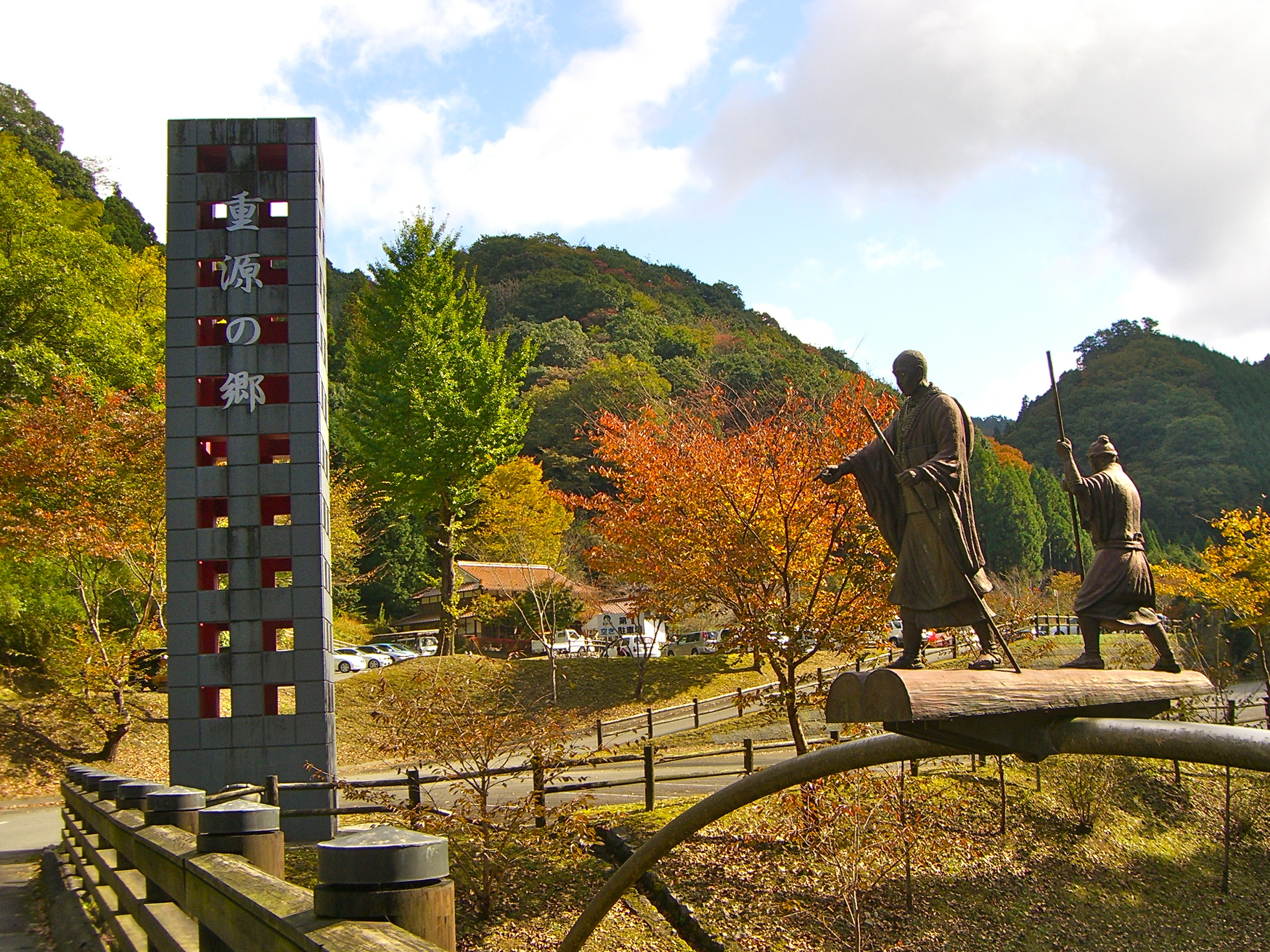 重源の郷入口